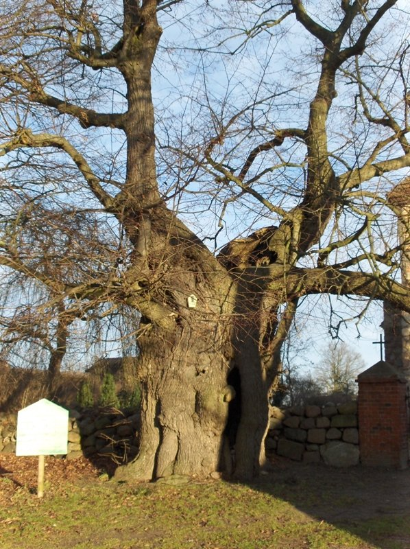 Franzosenlinde in Bargischow Category: Bargischow, Germany